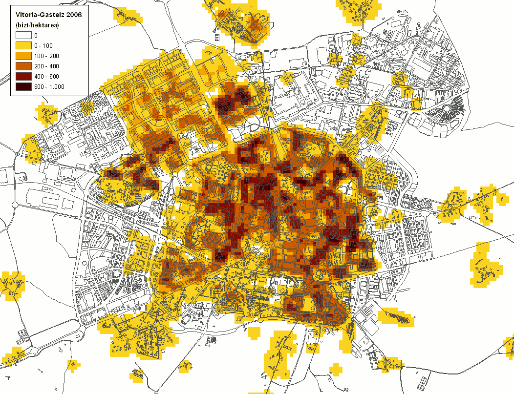 Gasteizko populazio dentsitatea, 2006. urtean